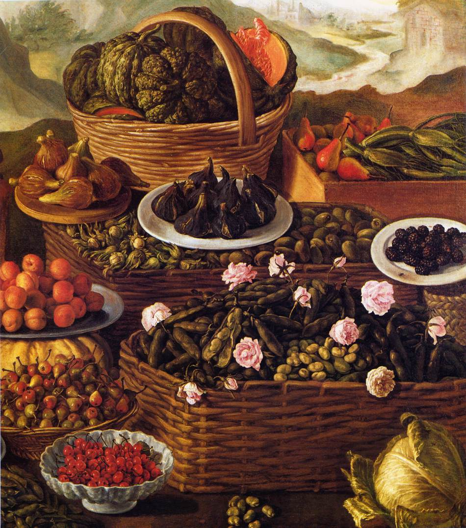 detail